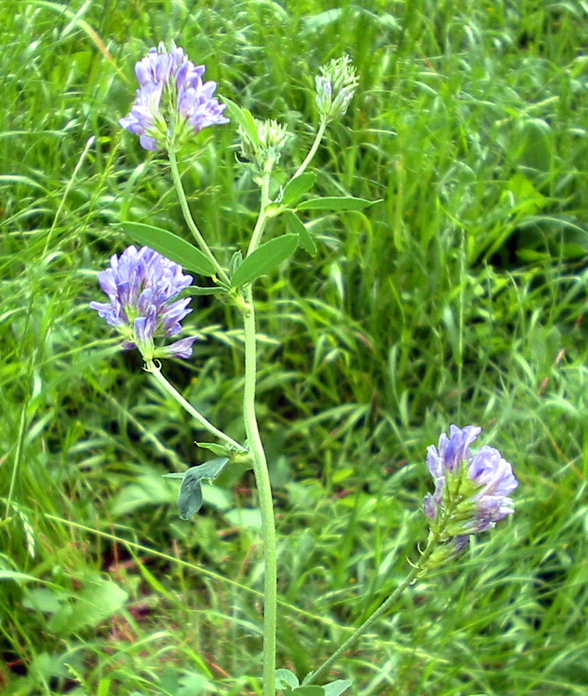 Medicago sativa, Fabaceae